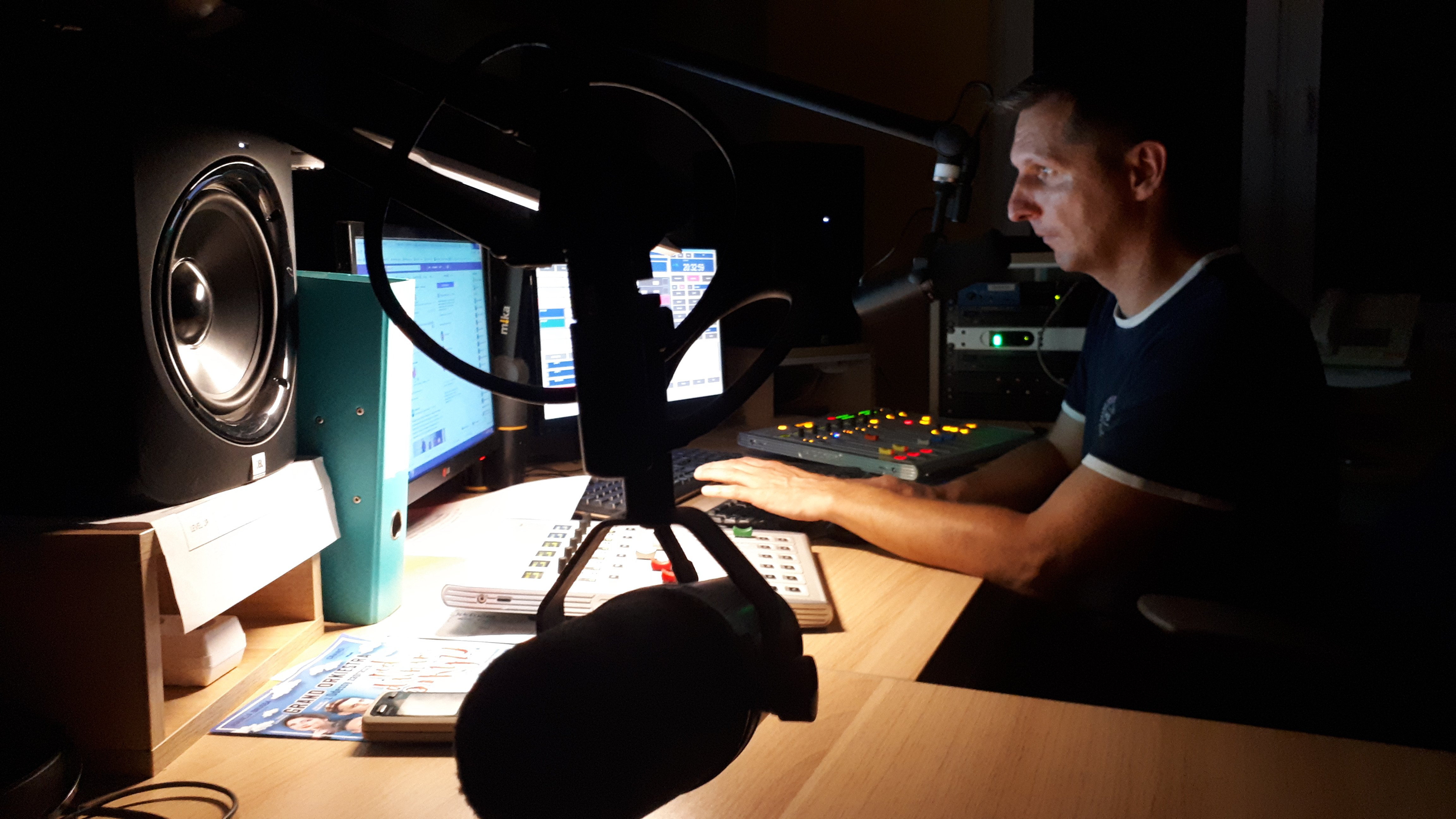 Radio RSC Prezenter Dariusz Machowski